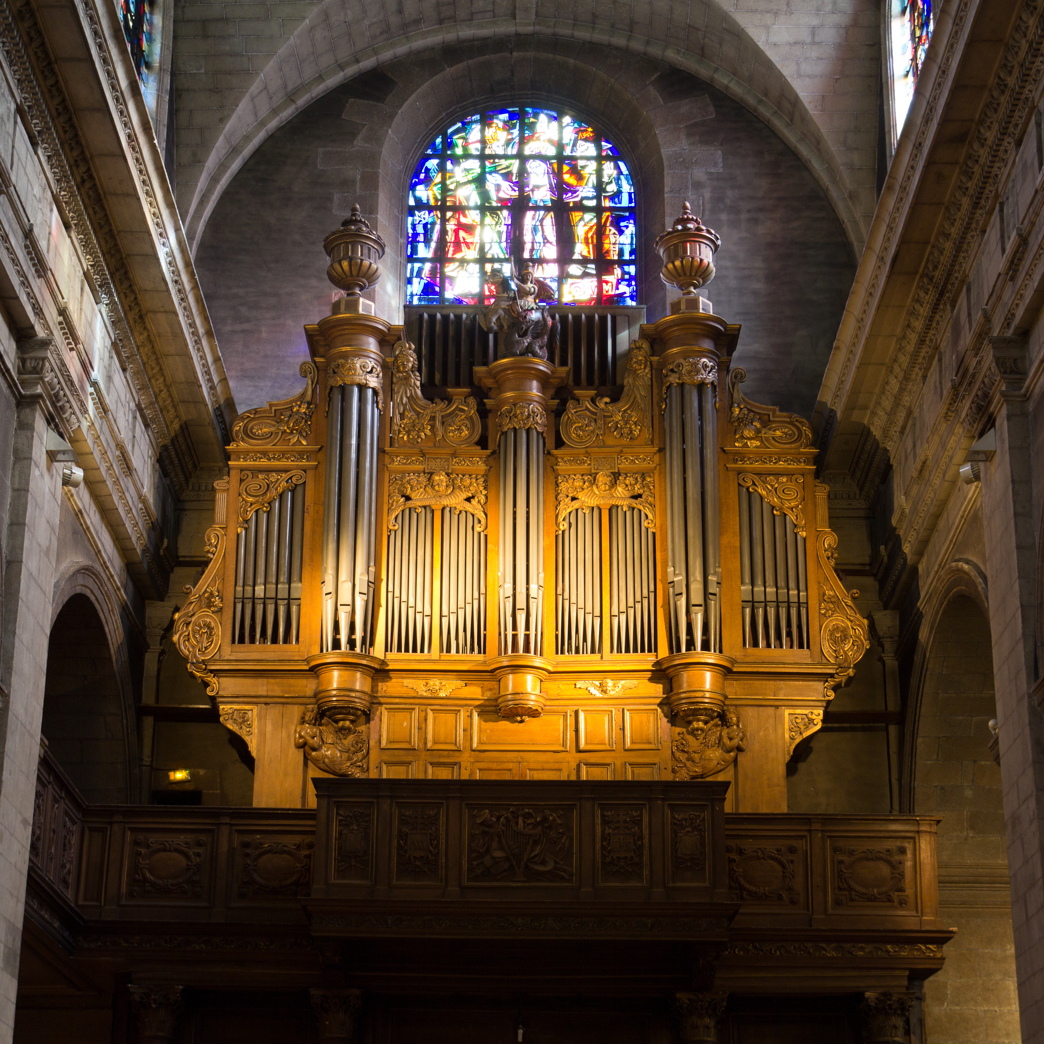 Orgue de la basilique Saint-Sauveur de Rennes, construit en 1866 par Merklin & Schütze, restauré en 1992 par Lucien SIMON.